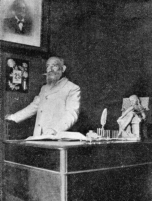 Luis A. Mestre, fotografía en Vida Gallega 1909